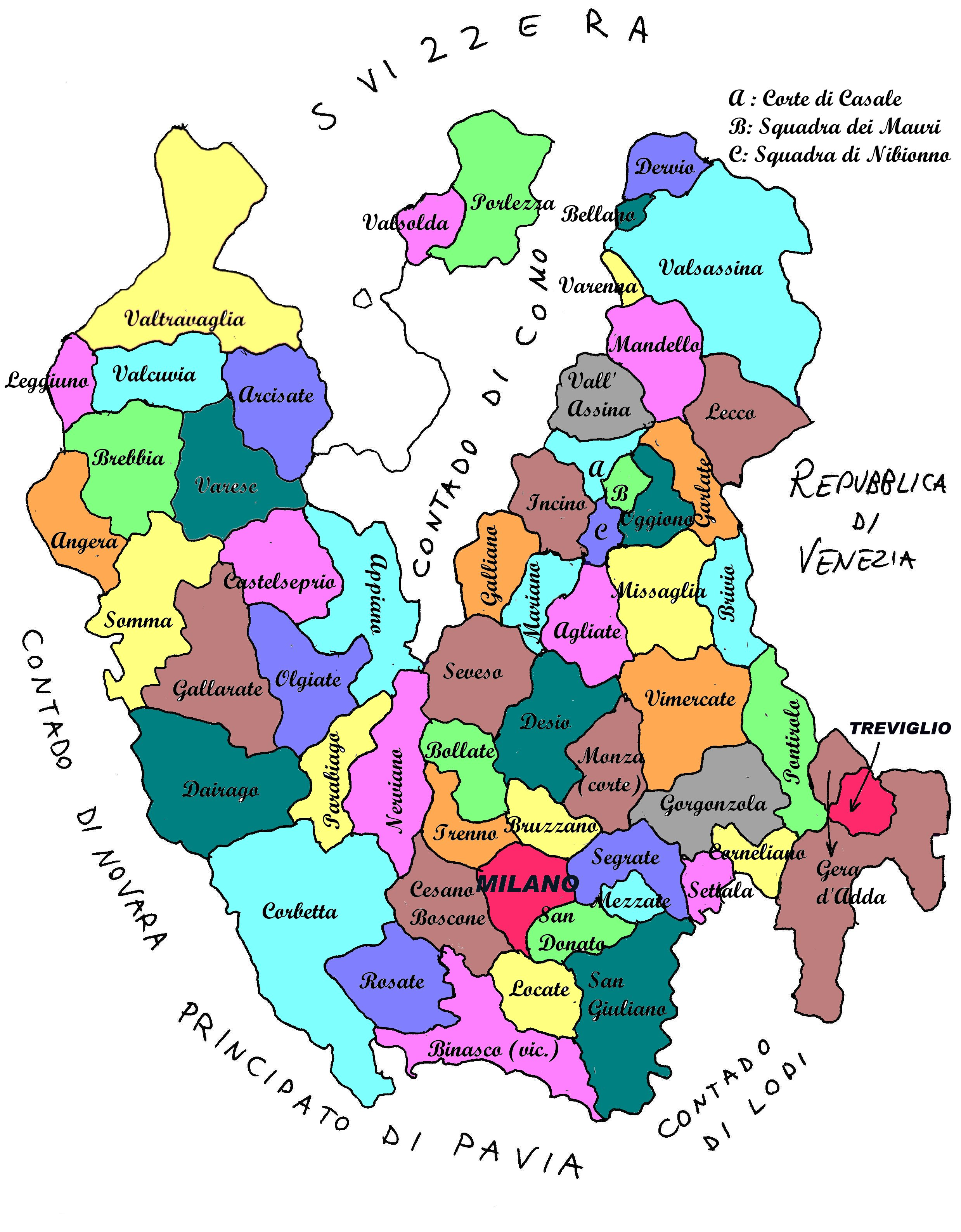 Pievi del Ducato di Milano